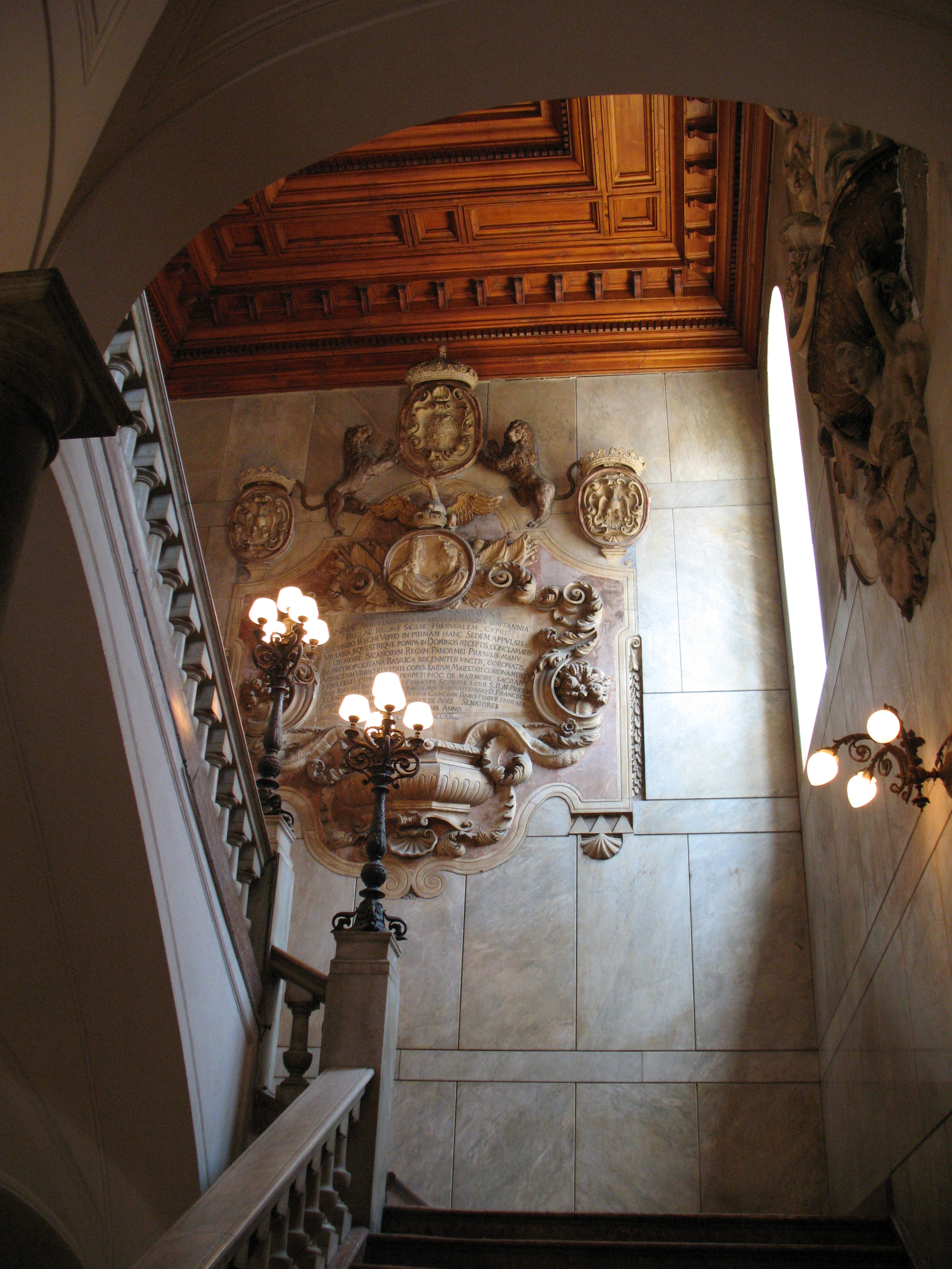 Palazzo Pretorio di Palermo, scalone